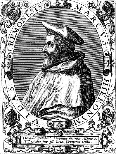 Portrait of Marco Gerolamo Vida (ca. 1480-1566)